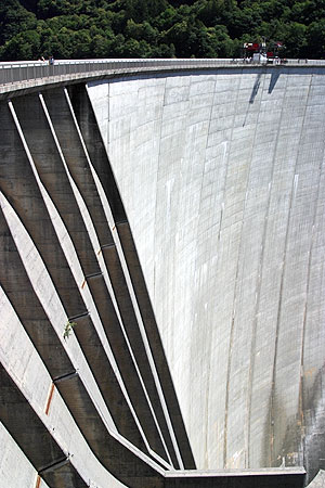 Staumauer (Talsperre des Val Verzasca) mit Jumping-Rampe